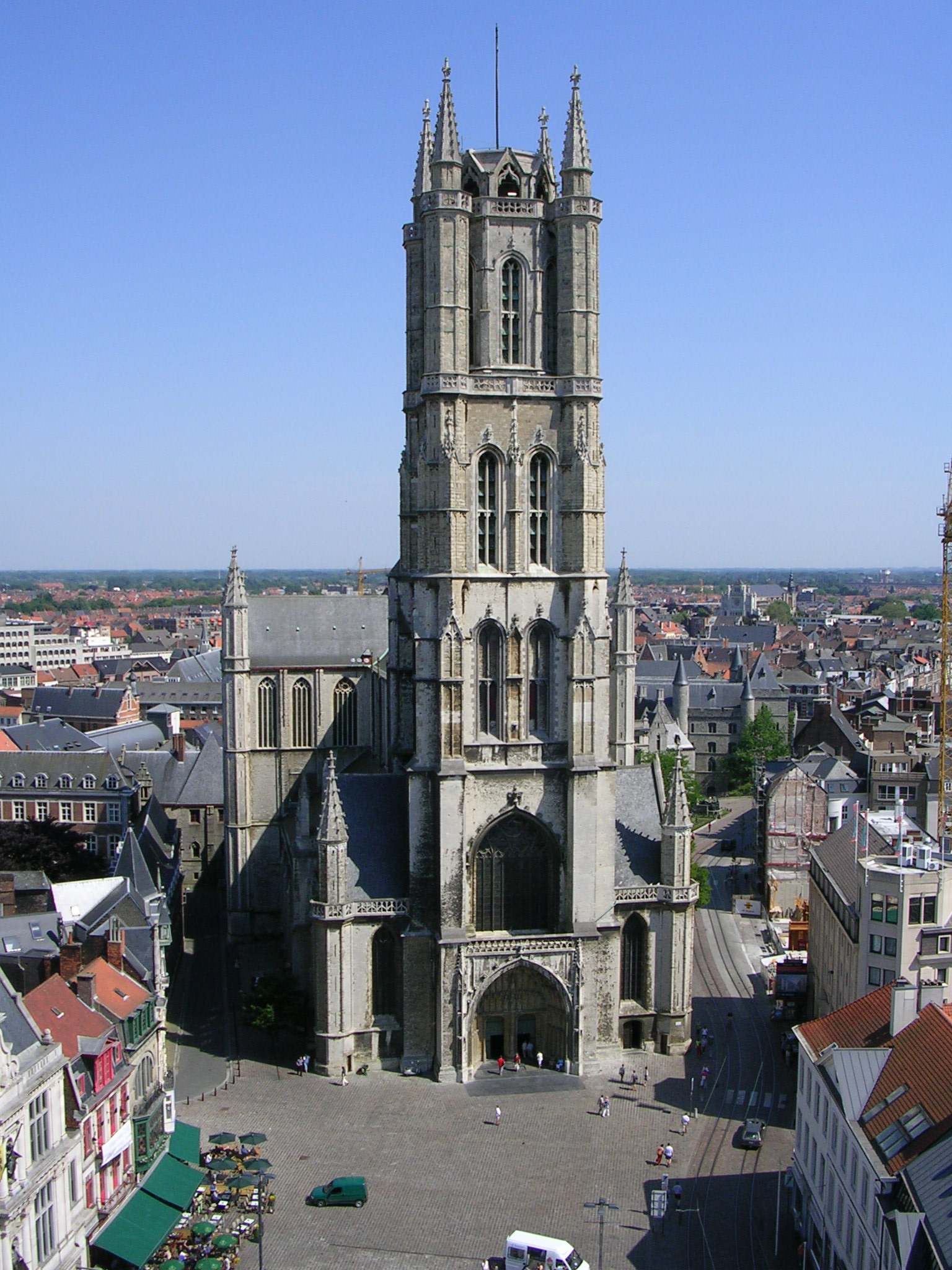 Die Sint Baafskathedraal in Gent, Belgien.